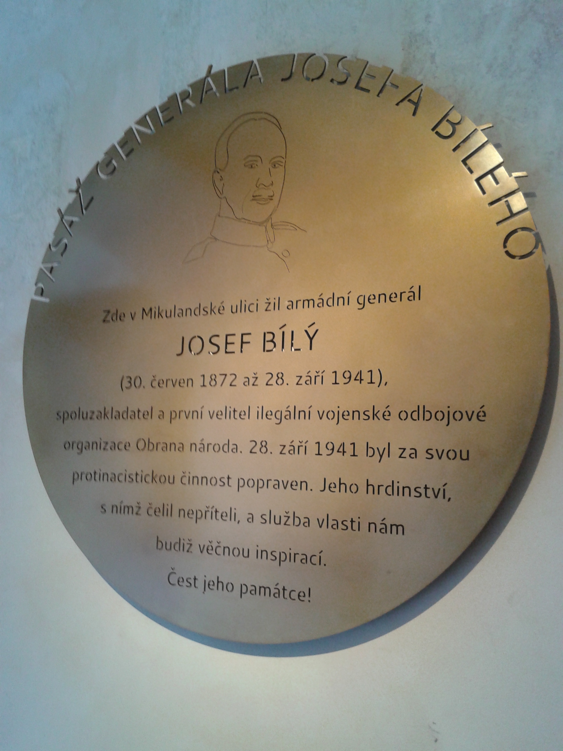 Dne 28. června 2018 byla v pasáži, která se nachází jen pár desítek metrů od domu v Mikulandské ulici číslo 122/4 a která „nárožně“ propojuje Národní třídu s Mikulandskou ulici v Praze, slavnostně odhalena kruhová kovová pamětní deska. Ta informuje kolemjdoucí o tom, že tato pasáž je pojmenována po generálovi Josefu Bílém - „Pasáž generála Josefa Bílého“. Nápis na pamětní desce v pasáži: PASÁŽ GENERÁLA JOSEFA BILÉHO // Zde v Mikulandské ulici žil armádní generál / JOSEF BÍLÝ / (30. červen 1872 až 28. září 1941) / spoluzakladatel a první velitel ilegální vojenské odbojové / organizace Obrana národa. 28. září 1941 byl za svou / protinacistickou činnost popraven. Jeho hrdinství, / s nímž čelil nepříteli, / a služba vlasti nám / budiž věčnou inspirací. / Čest jeho památce! Josef Bílý (* 30. červen 1872 Ochoz u Zbonína – 28. září 1941, popraven v Ruzyňských kasárnách v Praze) byl český generál a (za Protektorátu Čechy a Morava) velitel vojenské ilegální odbojové organizace Obrana národa.